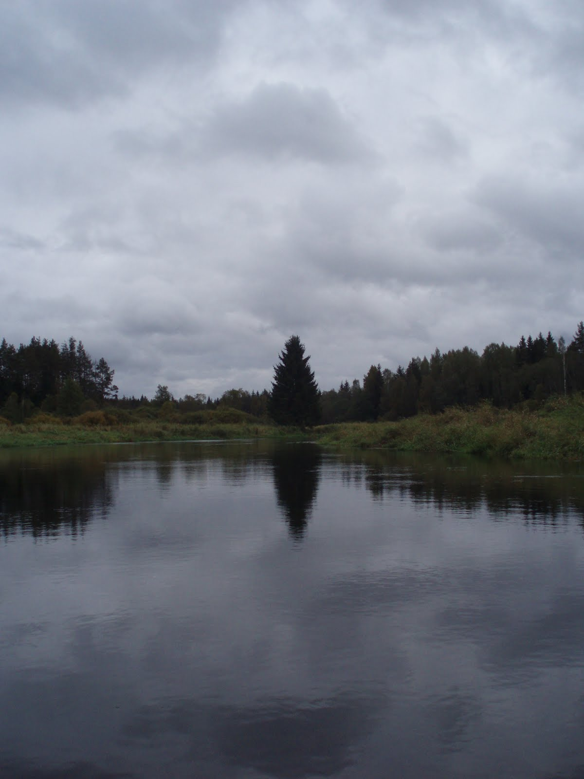 Один из заливных лугов на р. Селижаровка осенью.